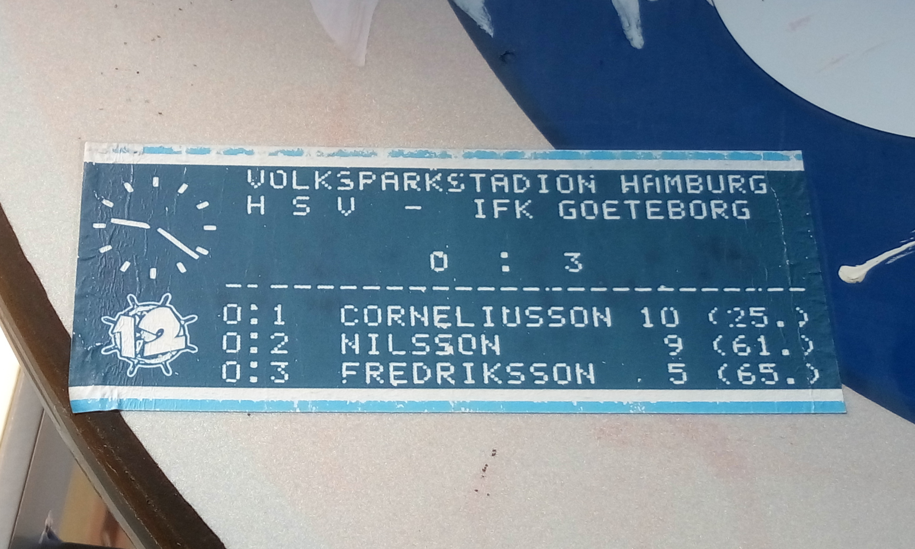 Sticker commémorant la victoire de l'IFK Göteborg contre le Hambourg SV lors du match retour de la finale de la coupe de l'UEFA 1982.